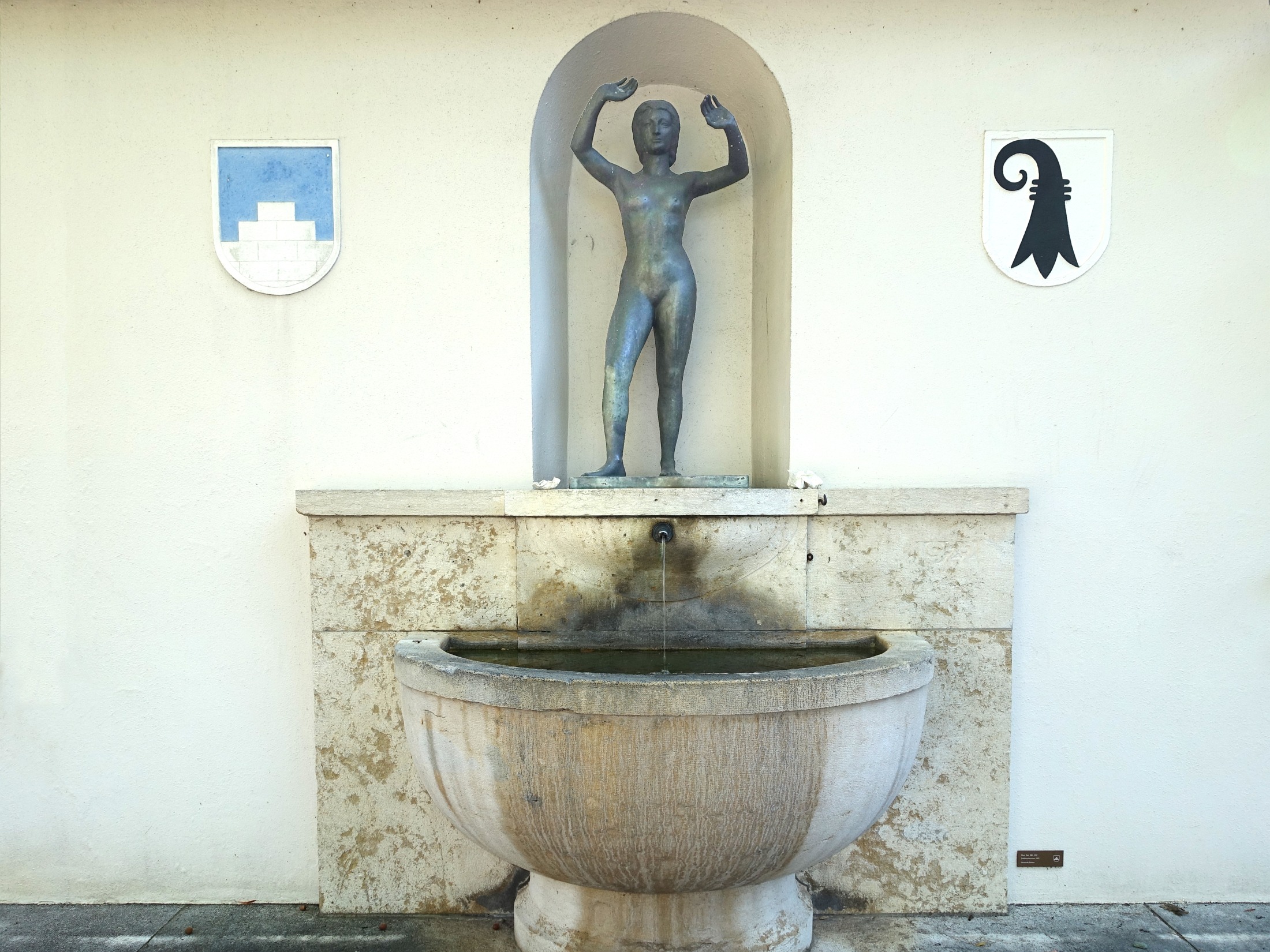 Brunnenskulptur (1925) von Hans Frei (1868–1947) zur Vierhundert-Jahr-Feier der Vereinigung Riehens mit Basel. Bei der Tramhaltestelle Burgstrasse